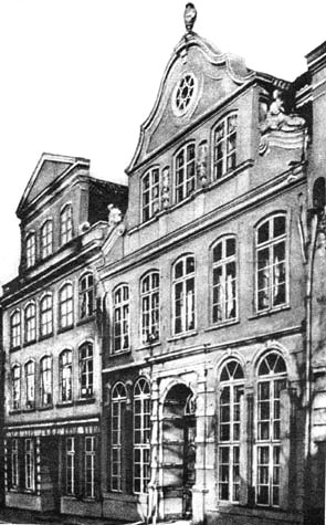 Ältestes bekanntes Foto des Buddenbrookhauses in Lübeck.